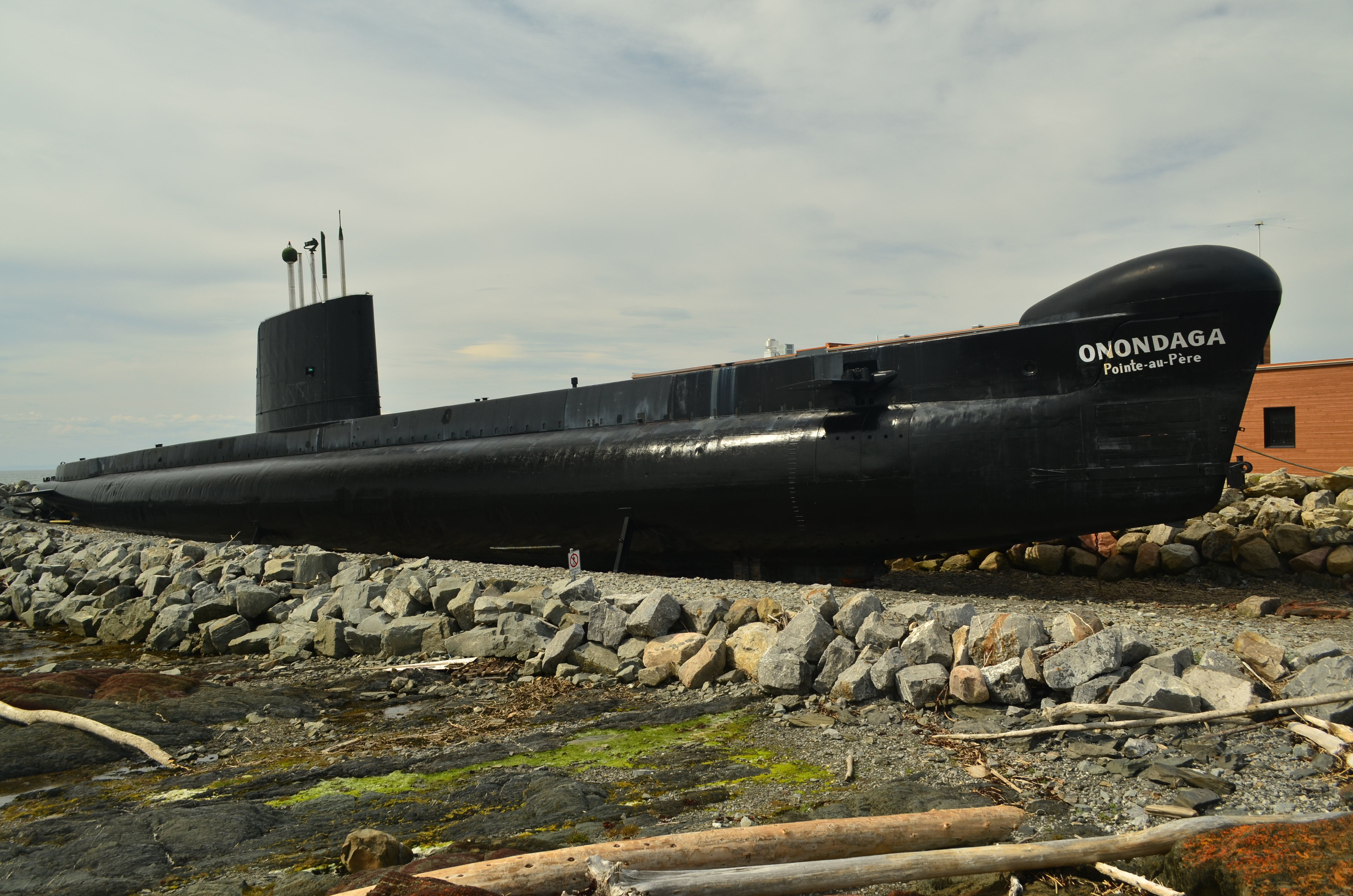 Au phare de Pointe-au-Père